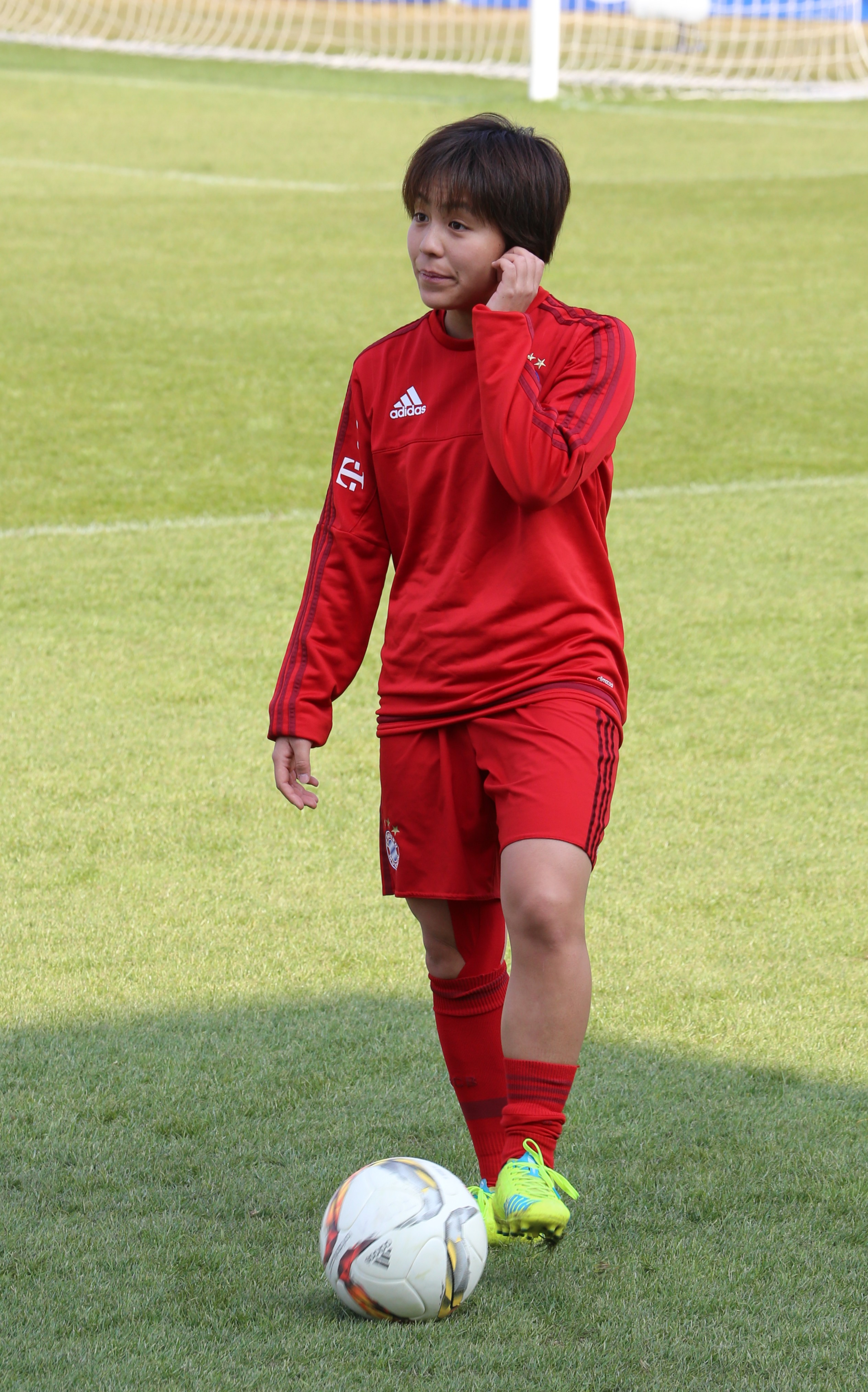 Mana Iwabuchi (FC Bayern München) beim Aufwärmen vor dem Frauen-Bundesliga-Spiel FC Bayern München gegen FF USV Jena am 19. März 2016 im Stadion an der Grünwalder Straße (Ergebnis war 5:1).